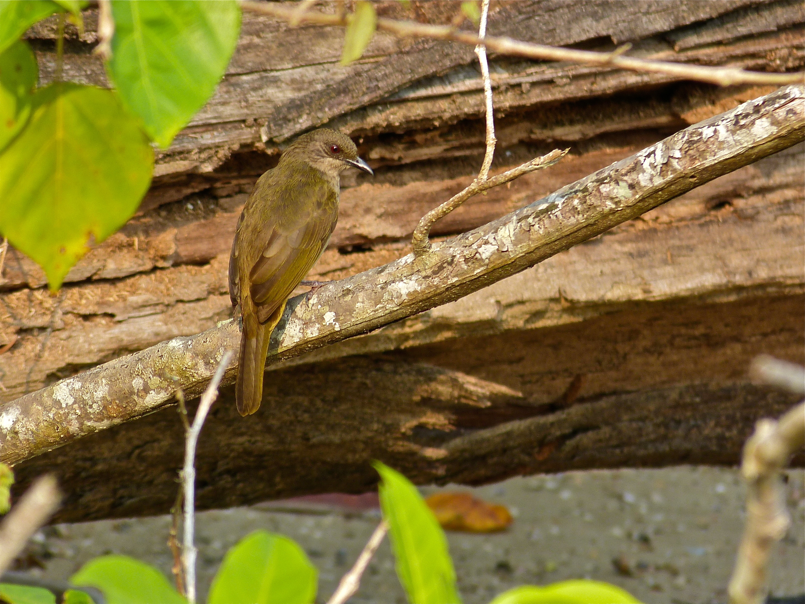 Bako NP, Sarawak, MALAYSIA